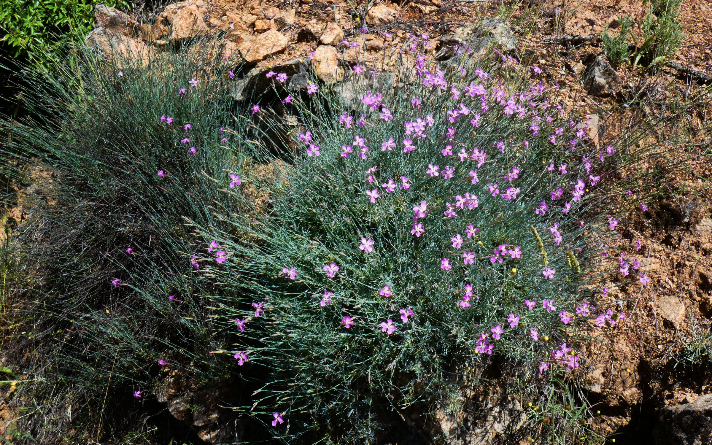 Planta de clavellinas o clavel silvestre (Dianthus lusitanus)